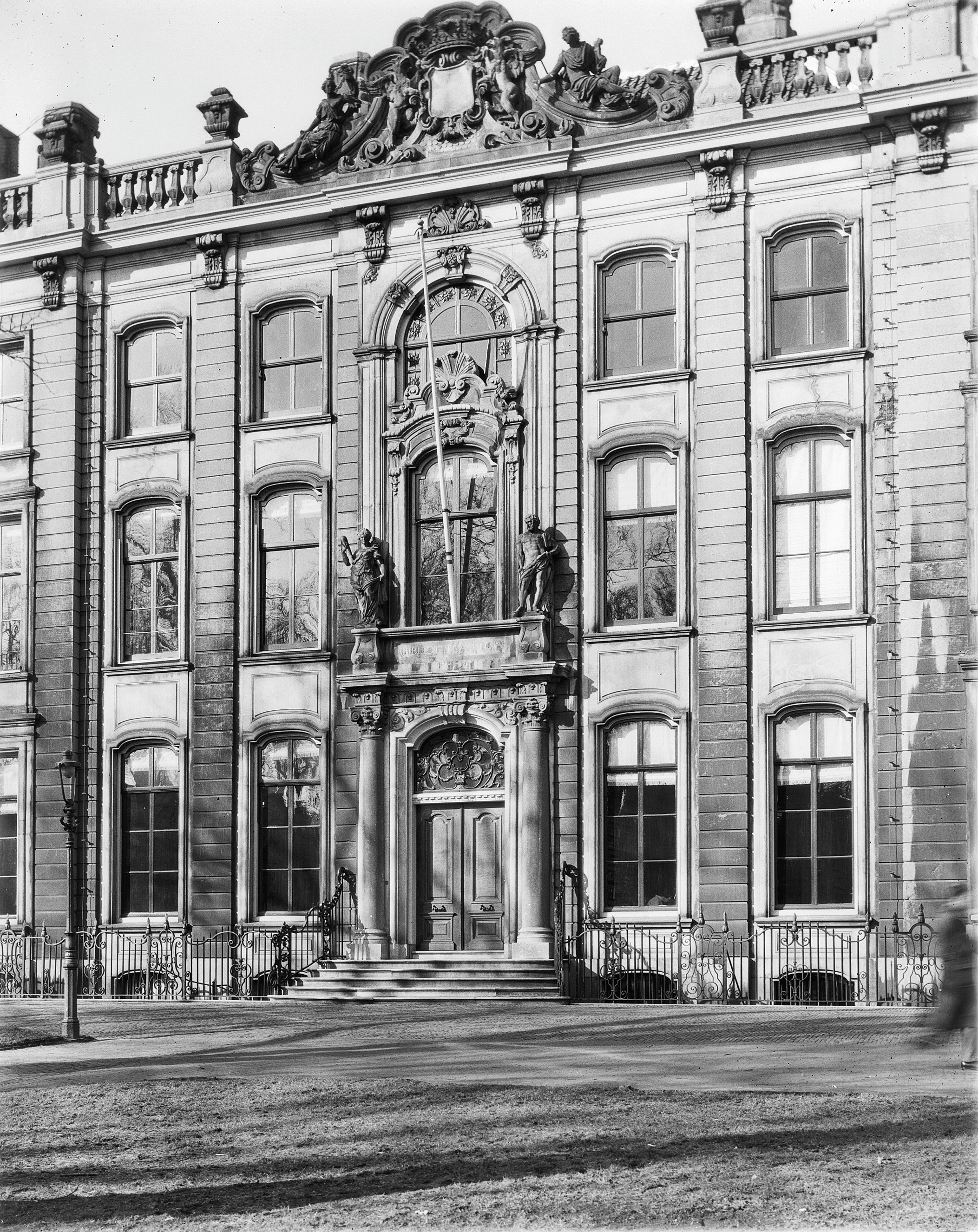 Kon.Bibliotheek: exterieur